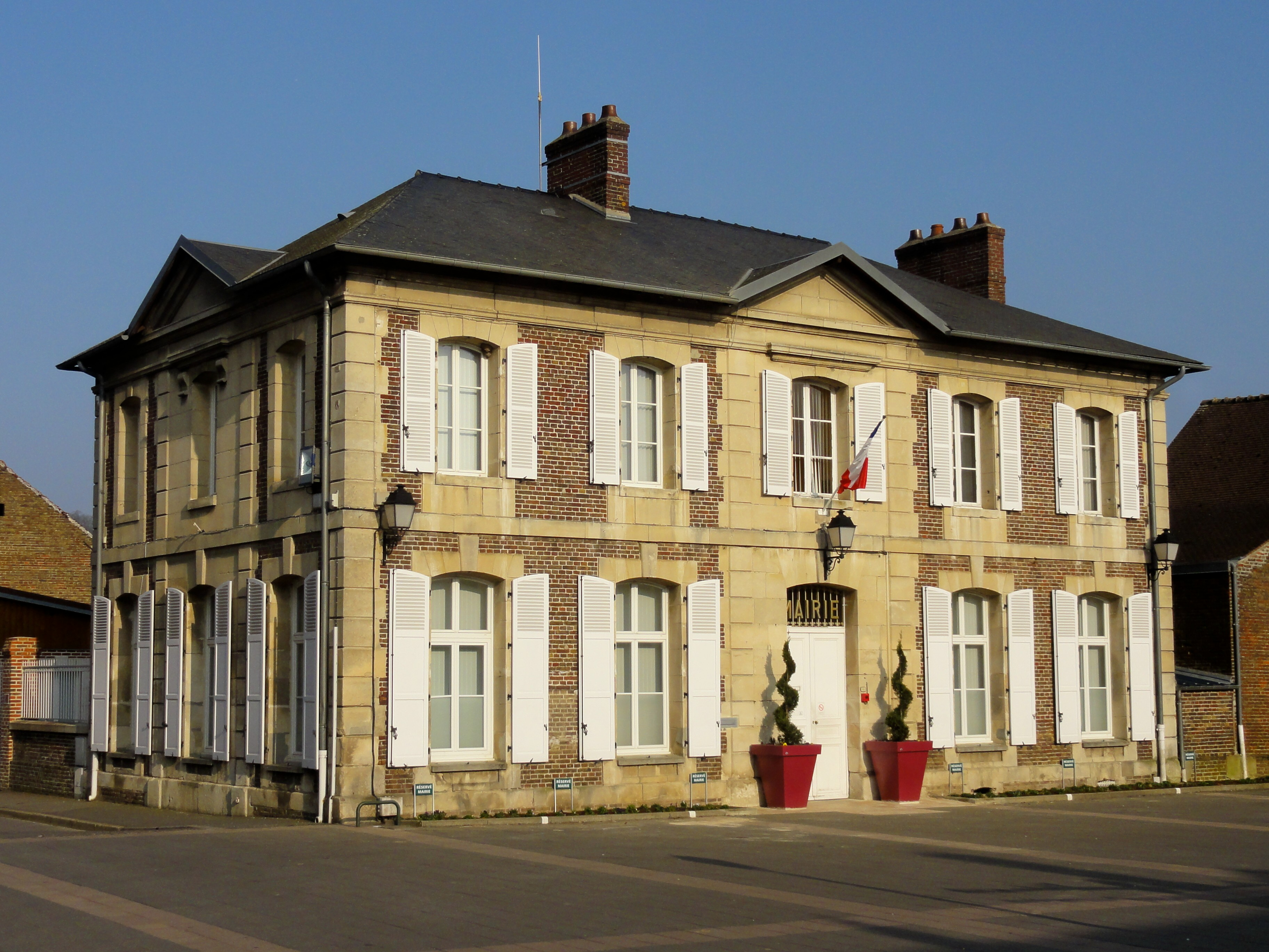 La mairie, rue de la République / rue du général Leclerc, près de l'église.